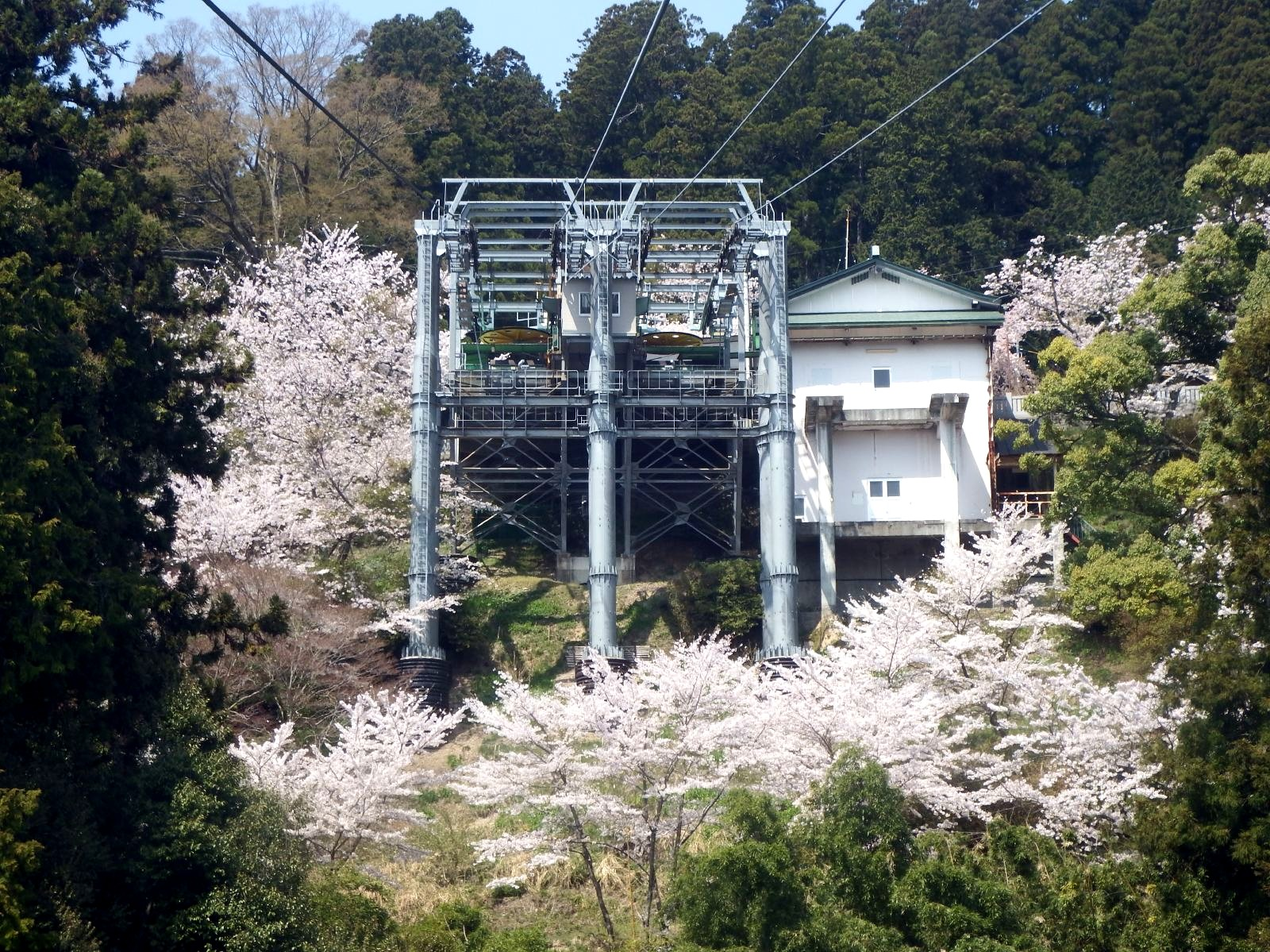 箸蔵ロープーウエイ山頂駅